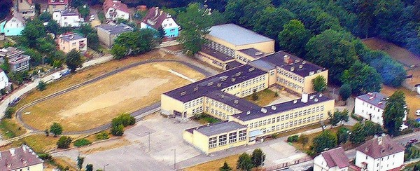 SP3 Gryfice z lotu ptaka